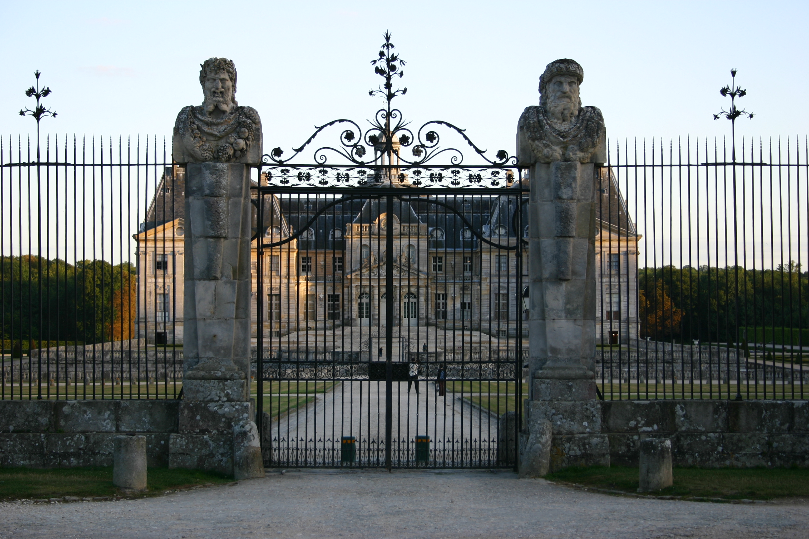 Château de Vaux-le-Vicomte, septembre 2005